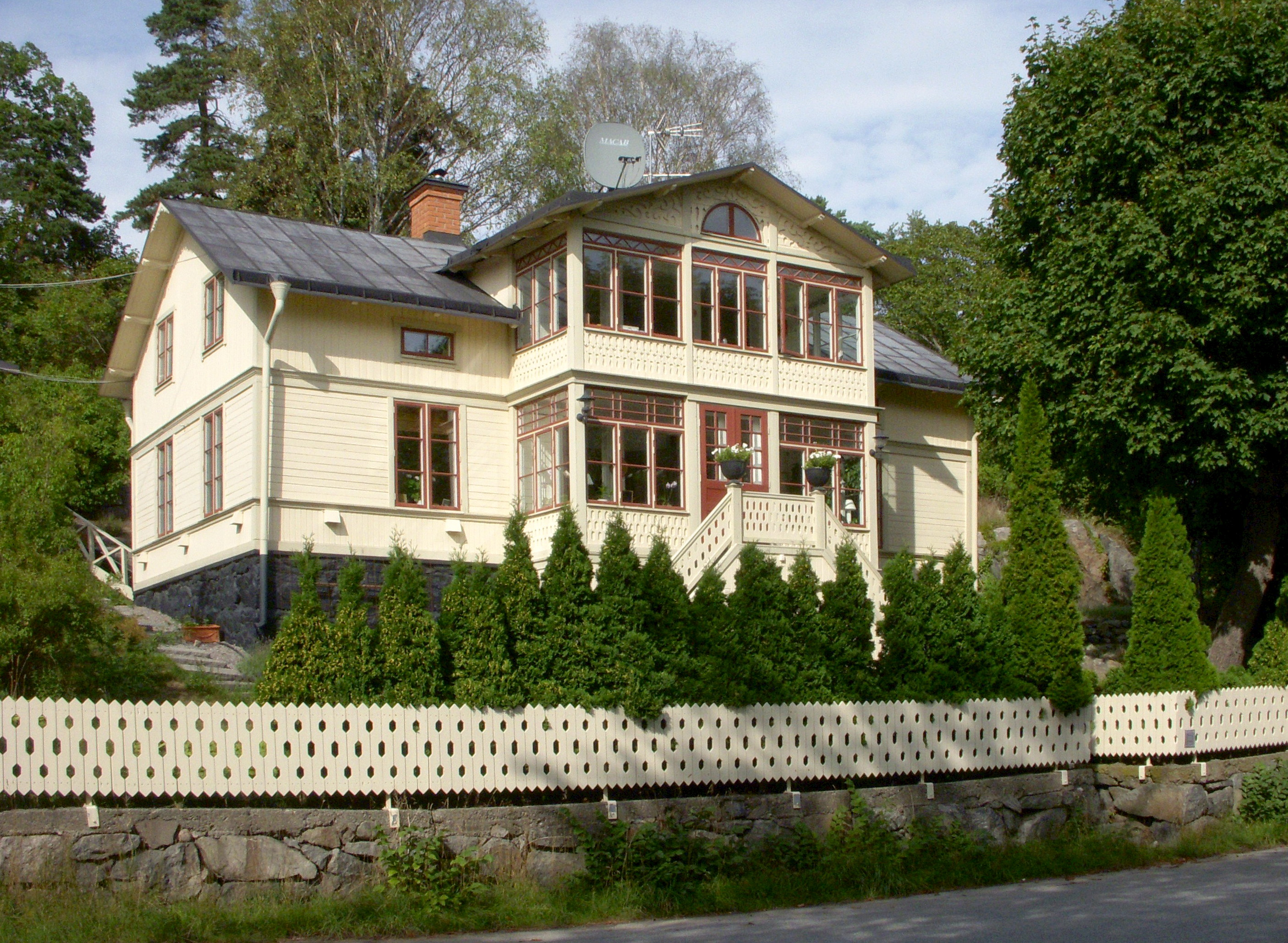 Villa Furuberg, Västra skogen, byggd 1883-1885 av stenhuggaren Sven Rundqvist. Huset är förmodligen hitflyttat från Skärgården.